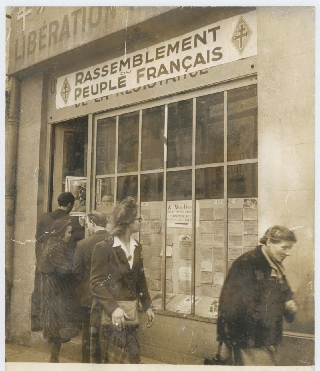 Permanence parisienne du Rassemblement du peuple français (RPF), vers 1947.